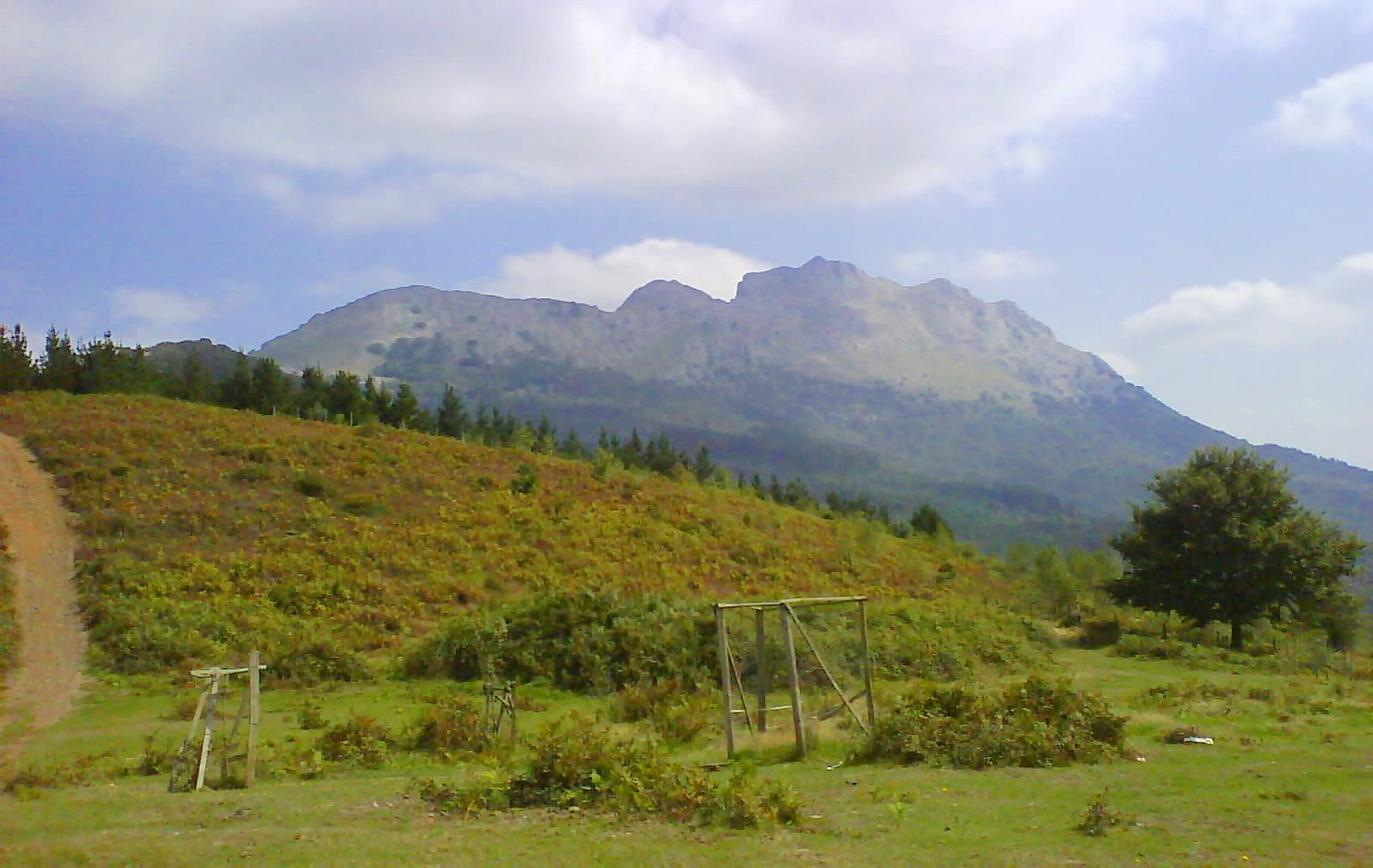 Udalaitz. País Vasco España